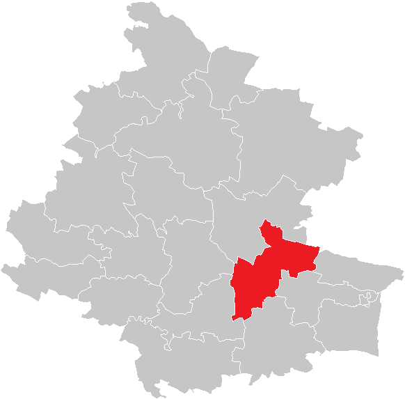 Bezirk Horn